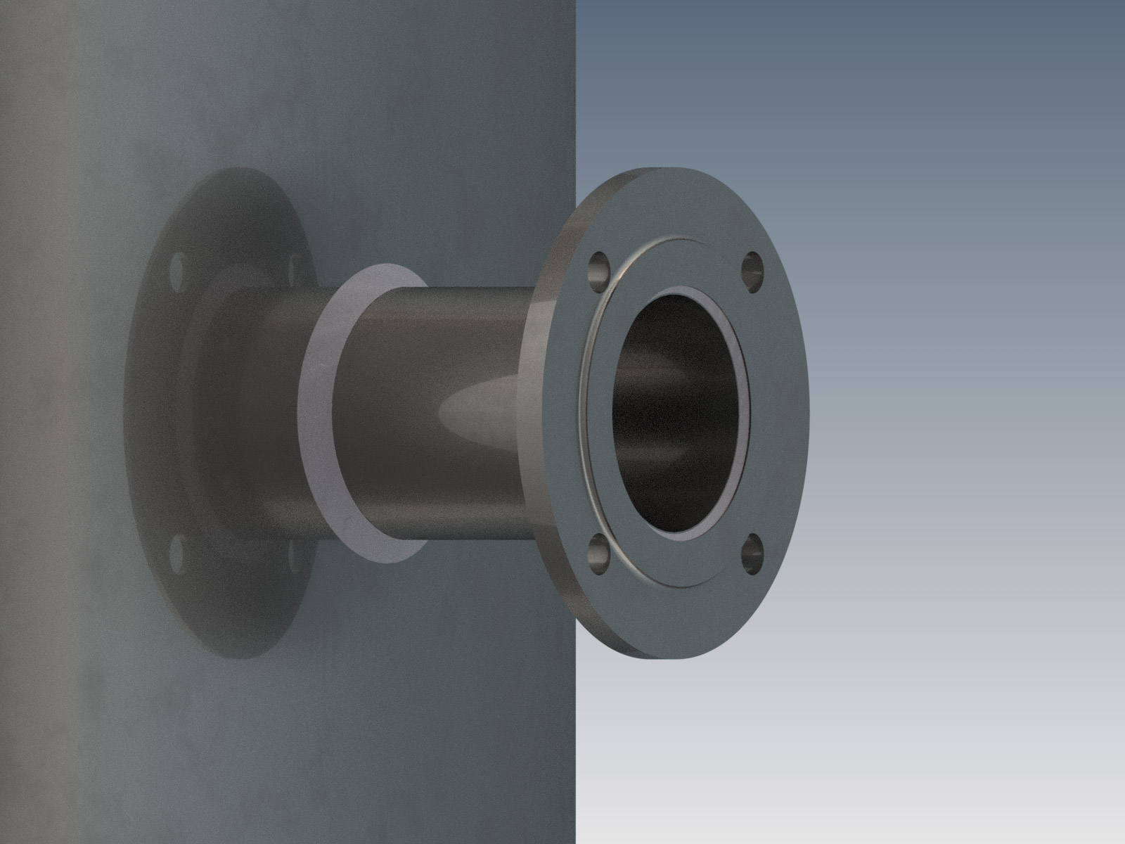 Króciec z kołnierzem wspawany w płaszcz zbiornika